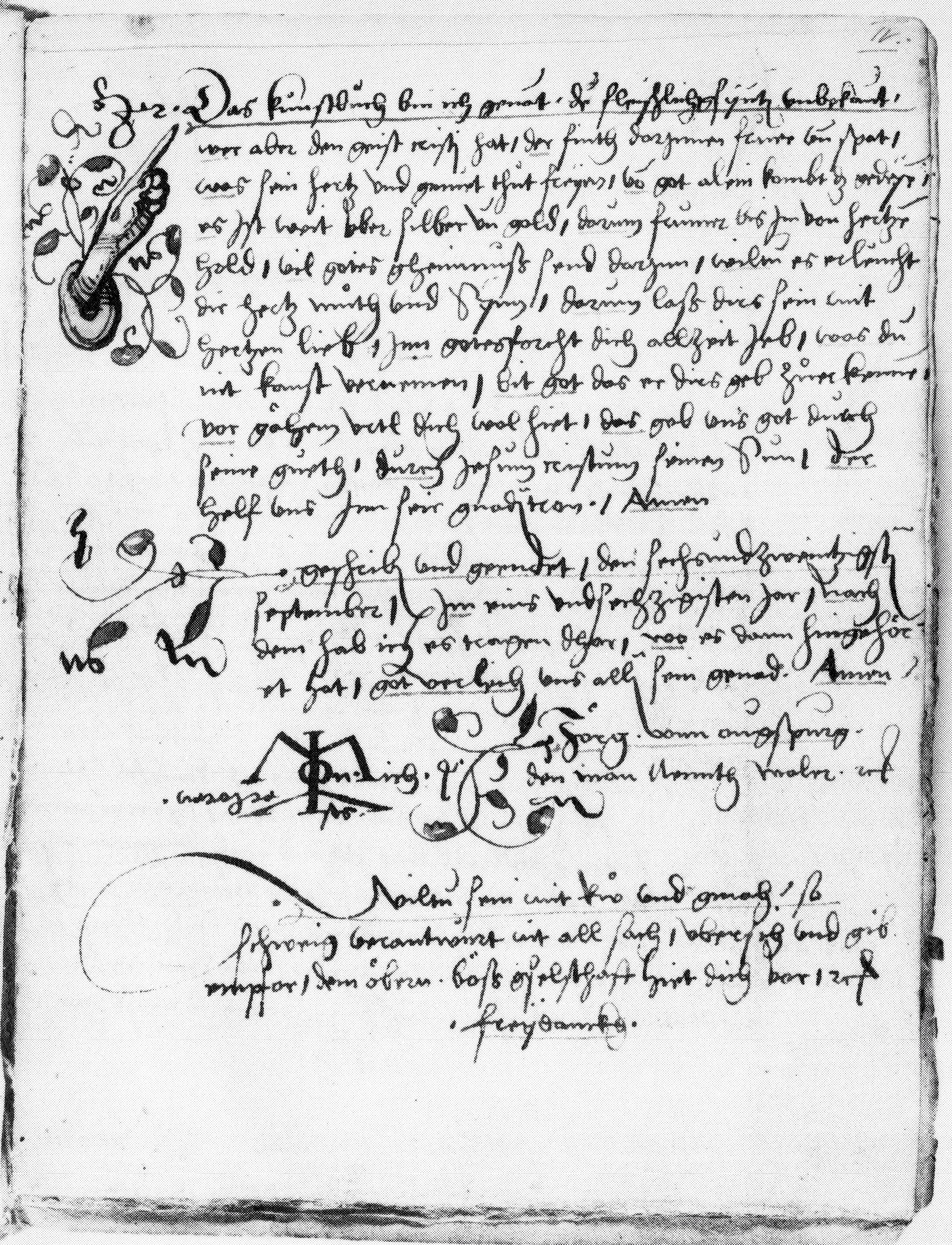 Titelblatt des von Jörg Maler zusammengestellten Kunstbuches. Das Kunstbuch enthält täuferische Schriften, die vor allem dem Marbeck-Kreis zuzuordnen sind.